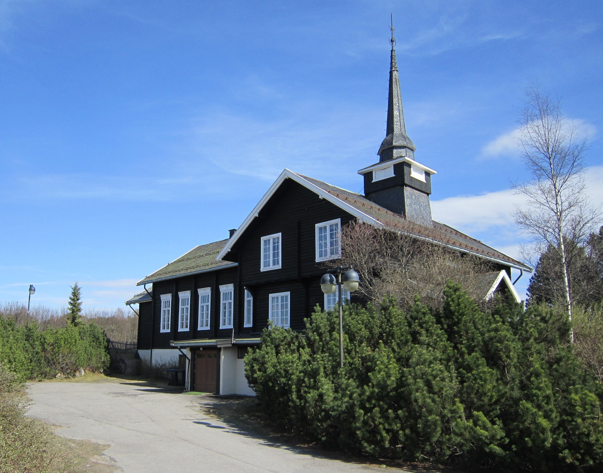 Heradsbygd kirke